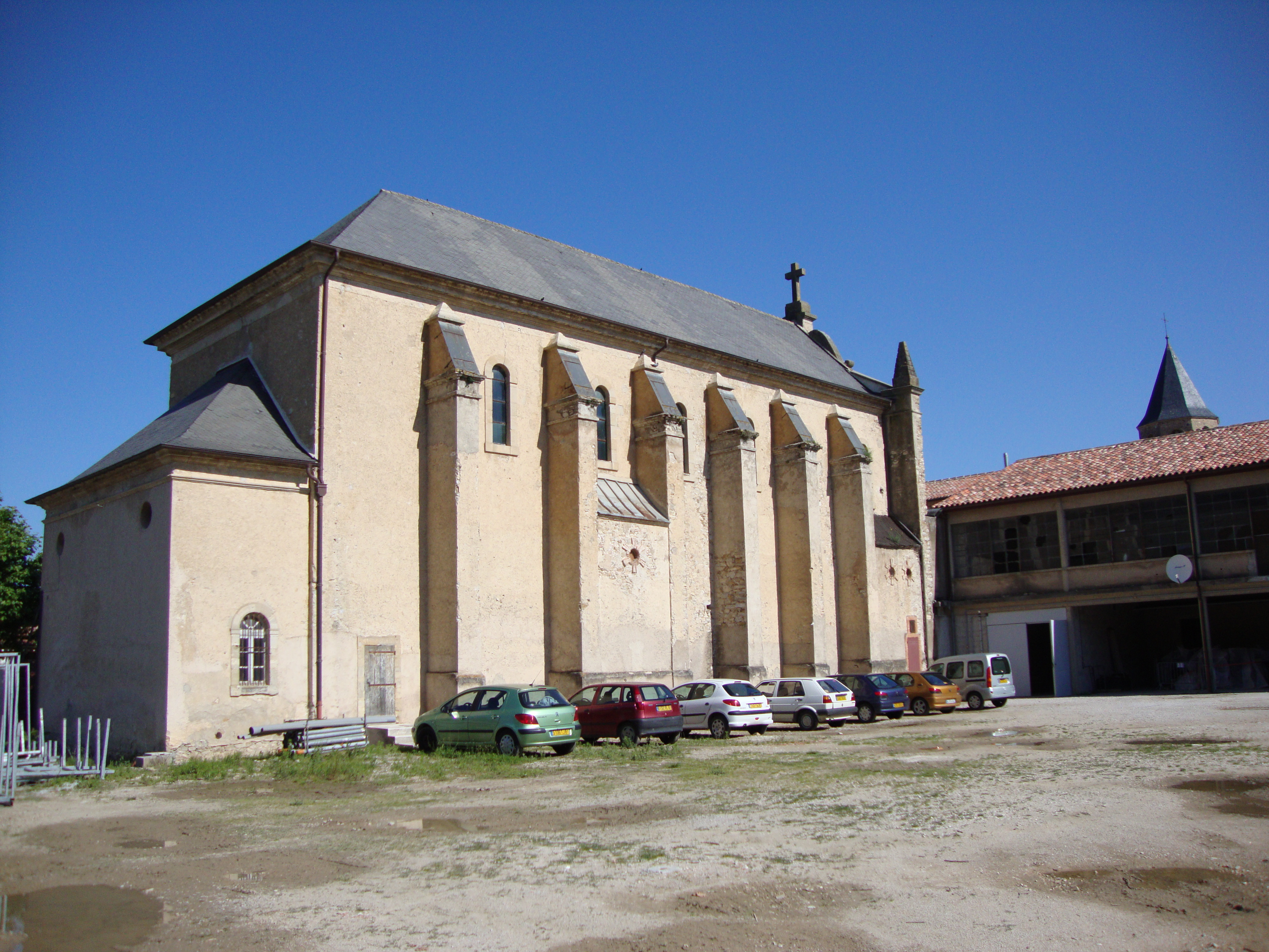 Sorèze (Tarn, Fr)chapelle des élèves de l'Abbaye-école